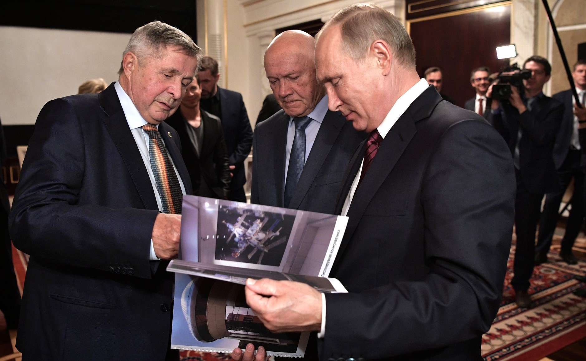 Встреча Президента России Владимира Путина со съёмочной группой фильма «Салют-7». С космонавтами – участниками экспедиции 1985 года Владимиром Джанибековым и Виктором Савиных (слева) после просмотра фильма «Салют-7».